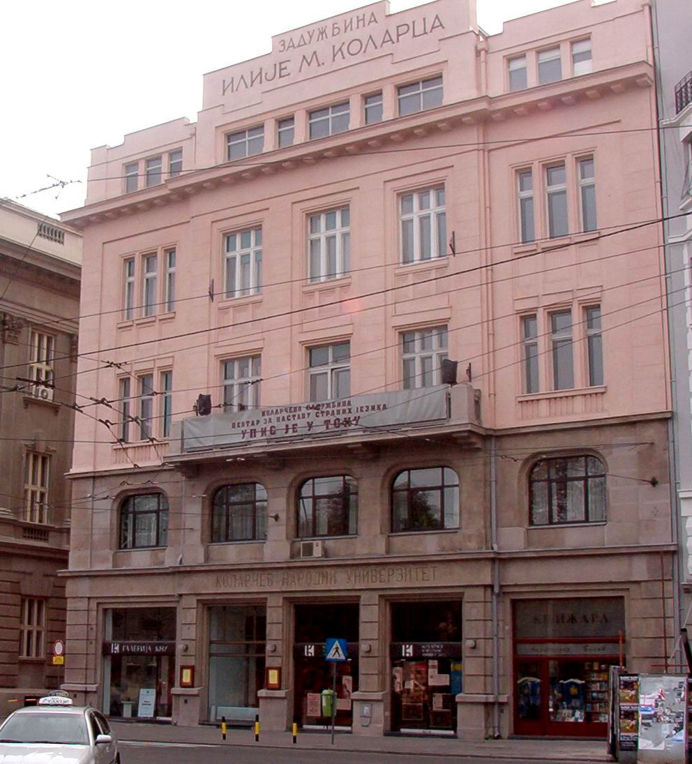 L'université Ilija Kolarac est située sur le Studentski trg (place des étudiants) à Belgrade, la capitale de la Serbie